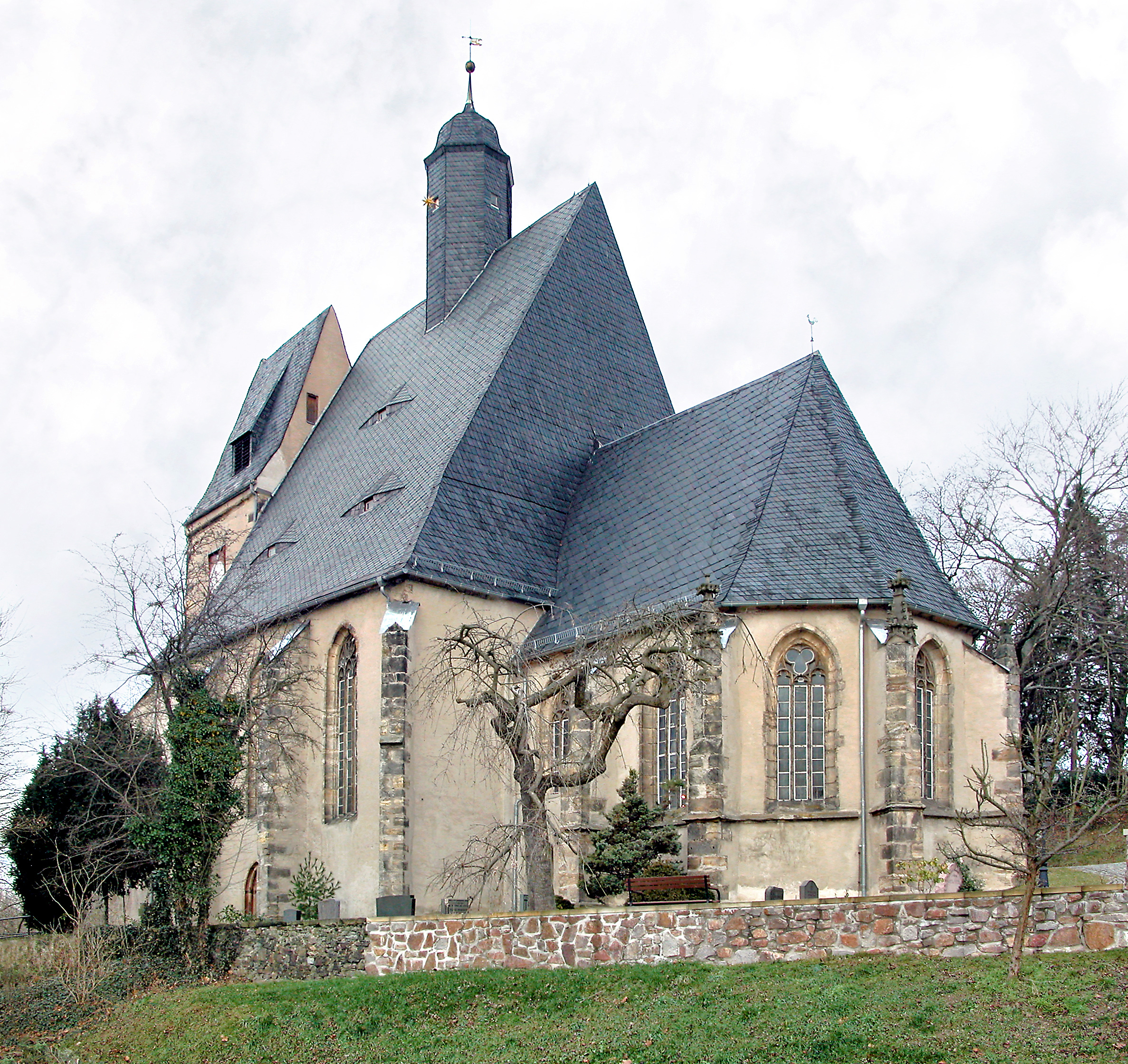 05.12.2009 01665 Burkhardswalde (Klipphausen) Kirchweg: Ehemalige Wallfahrtskirche (GMP: 51.073714,13.430011), Dorfkirche. Dreischiffige spätgotische Hallenkirche (15. Jahrhundert). Sicht von Südosten. [DSCN40315-40316.TIF]20091205050MDR.JPG(c)Blobelt